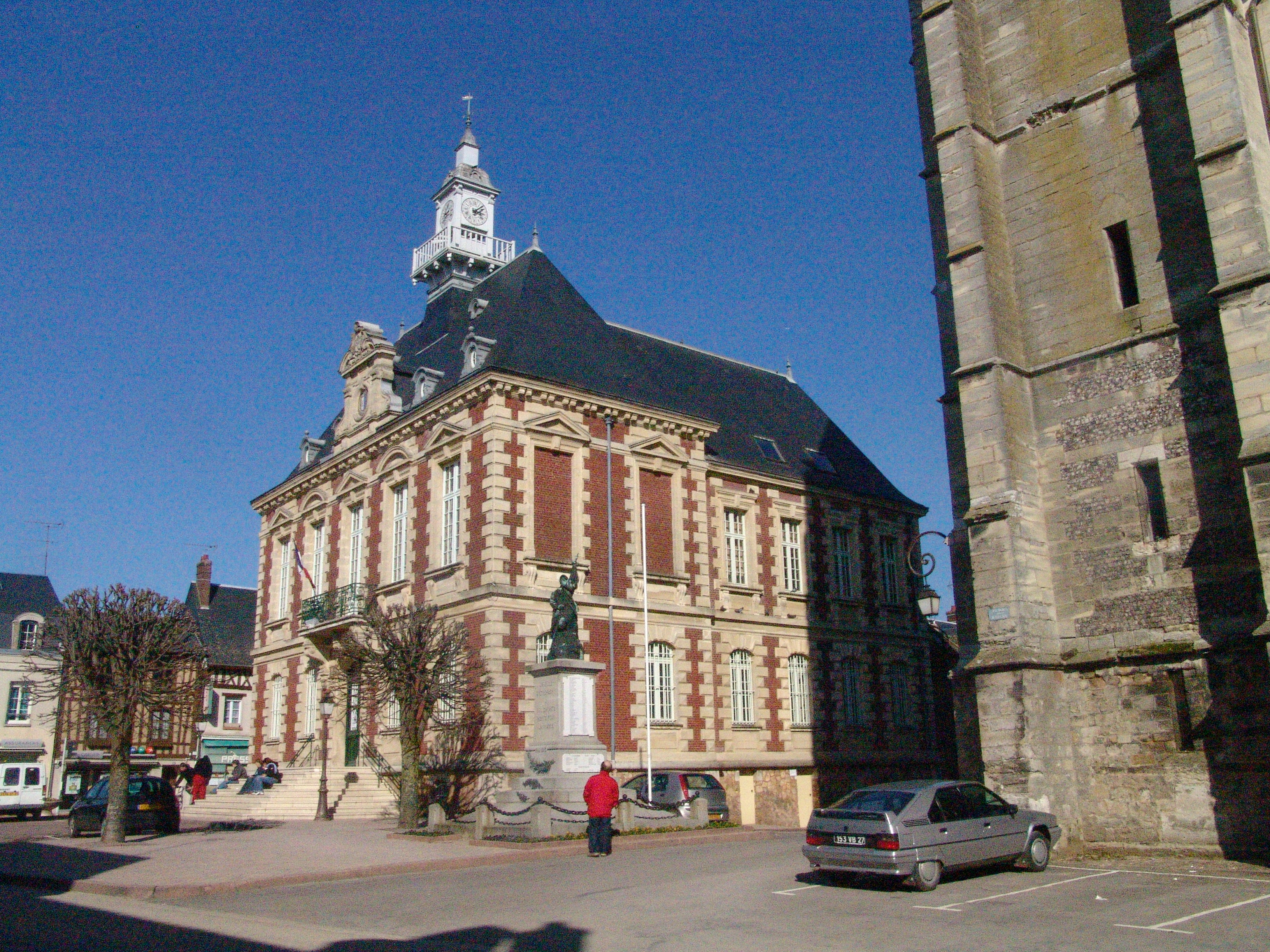 vue de la mairie d'Étrépagny (Eure, Normandie).